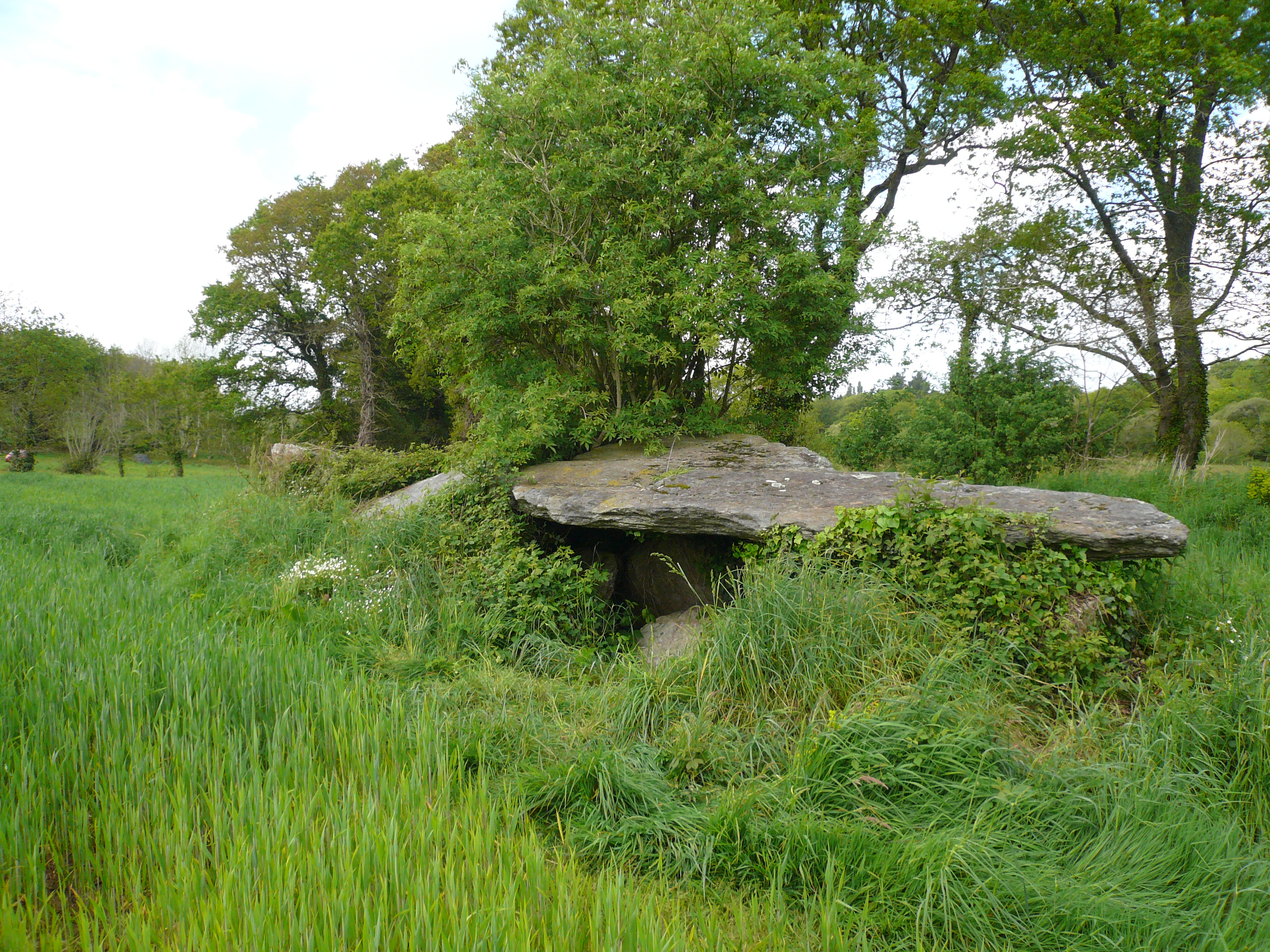 Vue de l'intérieur de l'allée couverte de Loc'h ar Pont (dite « Ti ar c'horrikaned ») en Melgven, Finistère, Bretagne, France.